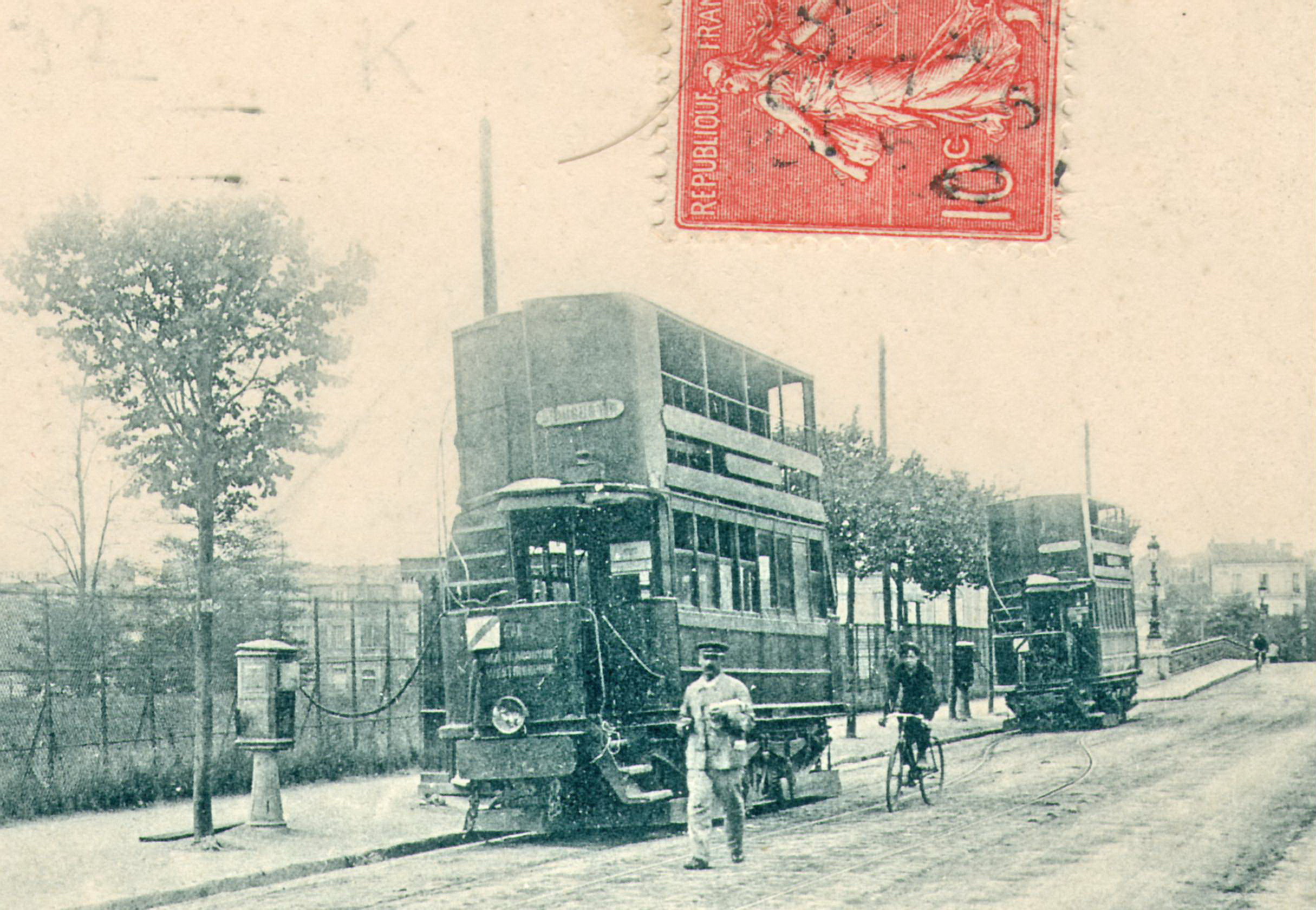 Carte postale ancienne éditée par Marmuse N° 49 (détail) Pont de Puteaux - Station des Tramways tramway à accumulateur des TPDS devant son poste de recharge